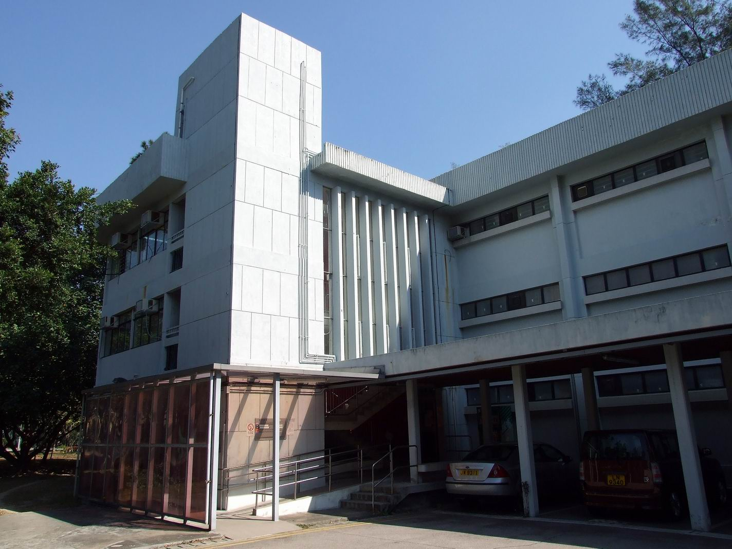 中文（香港）: 九龍醫院護士學校